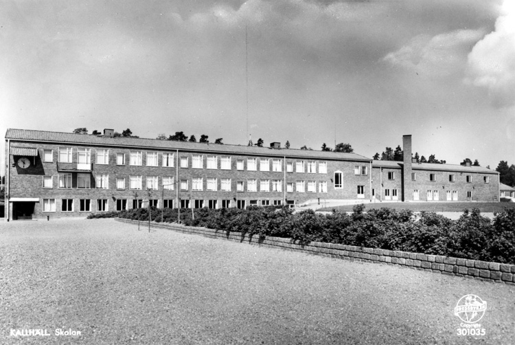 Ulvsättraskolan i Kallhäll med skolgården i förgrunden, 1950-talets mitt. Bildnr 01285.